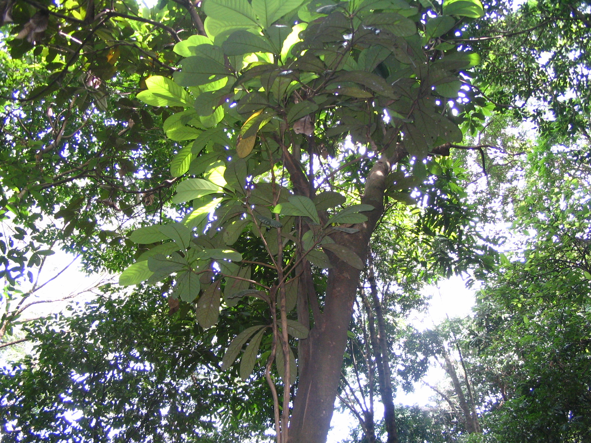 Litsea grandis - Bukit Nanas Forest Reserve - Kuala Mumpur - Malaisie